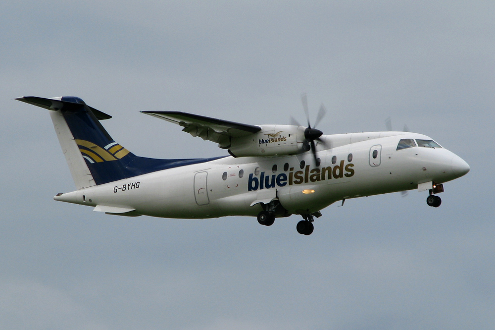 Do 328 der Blue Islands im Anflug auf Zürich